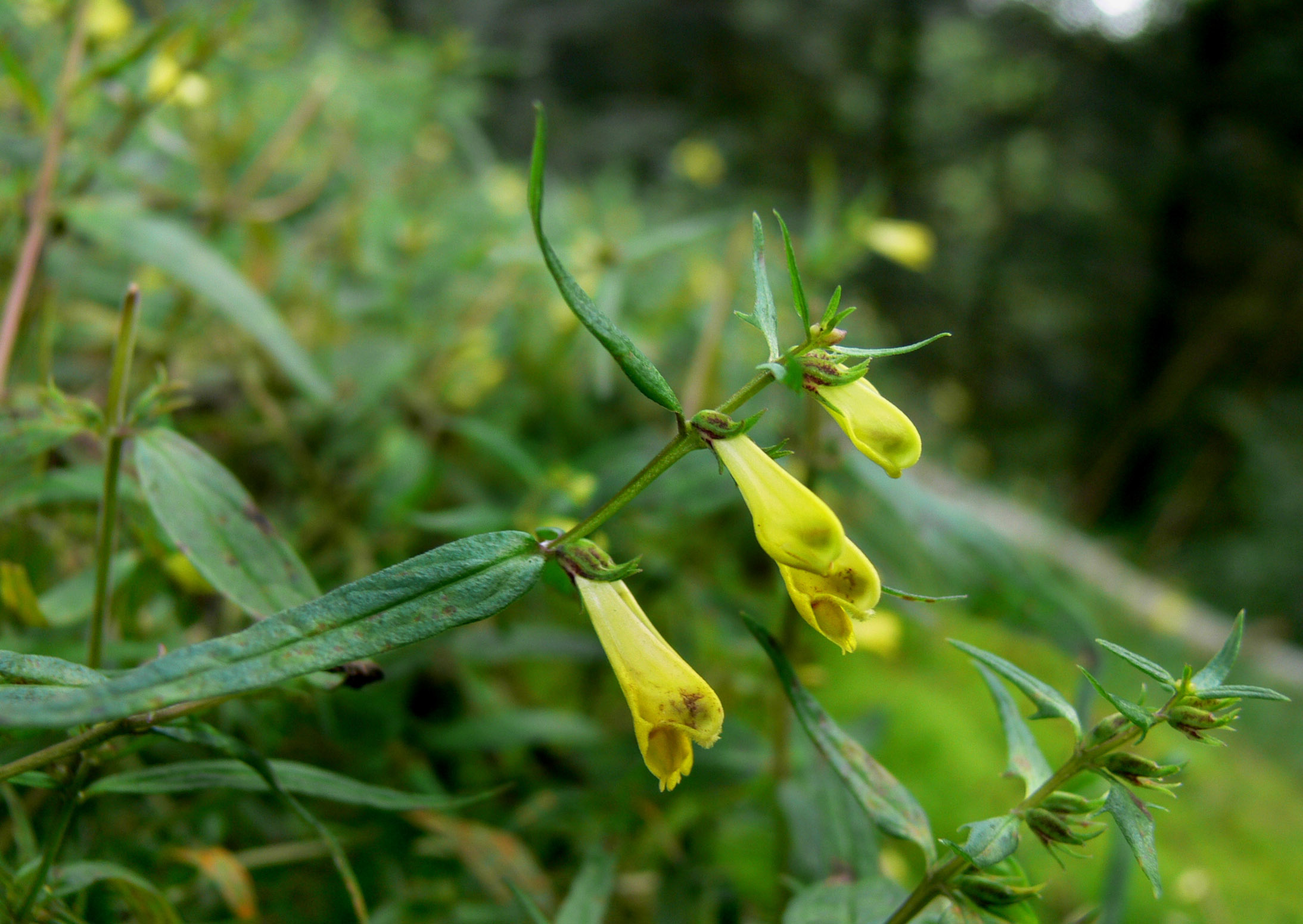 Mélampyre des prés (Melampyrum pratense, Scrophulariaceae ), hôte du papillon de jour Mélitée du mélampyre, ici en zone claire de la «Forêt domaniale de Fossard», Vosges (milieu acide), France